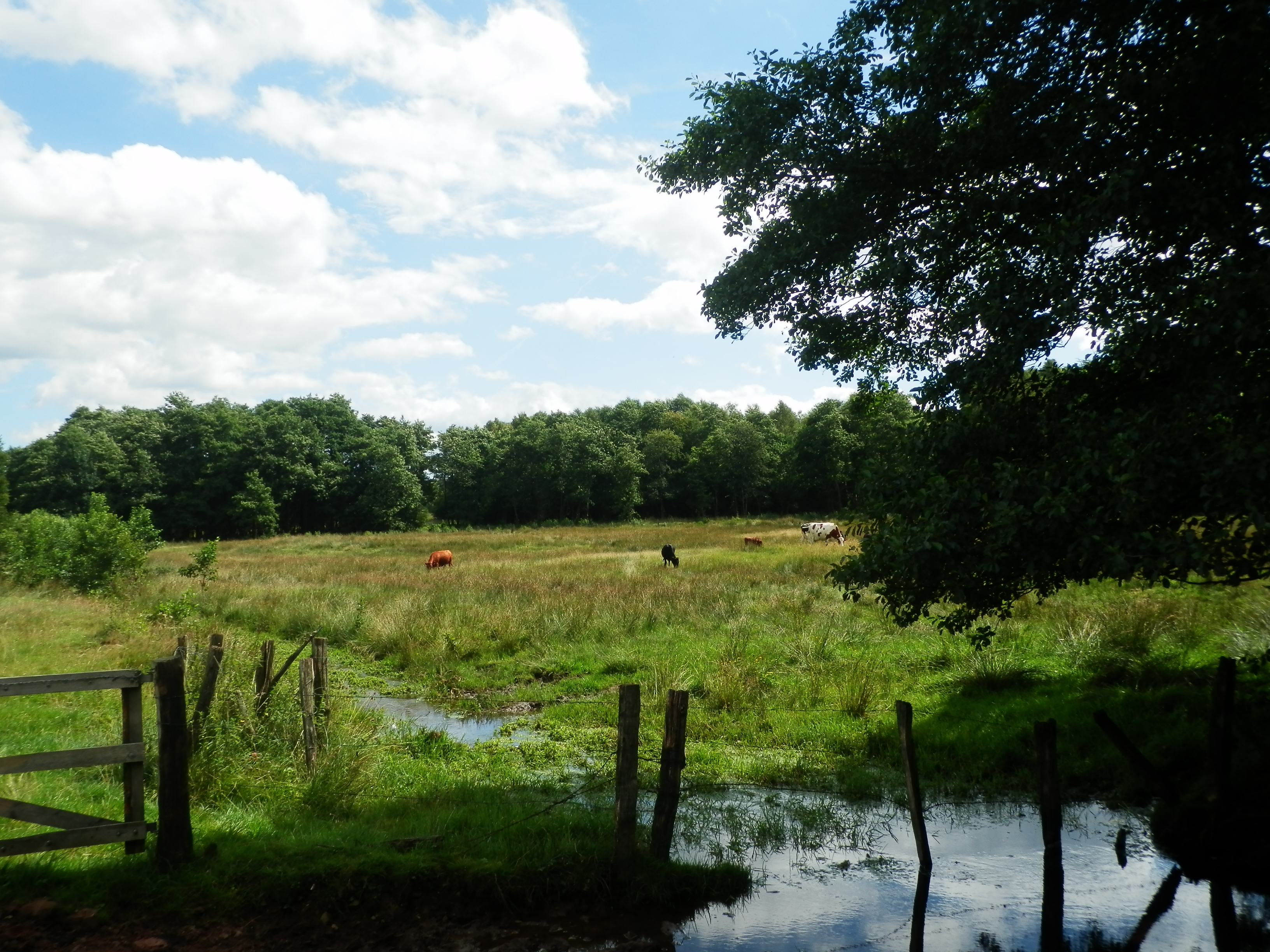 Eselsbett in der Nähe von Hakenberg (Lichtenau Westf.)